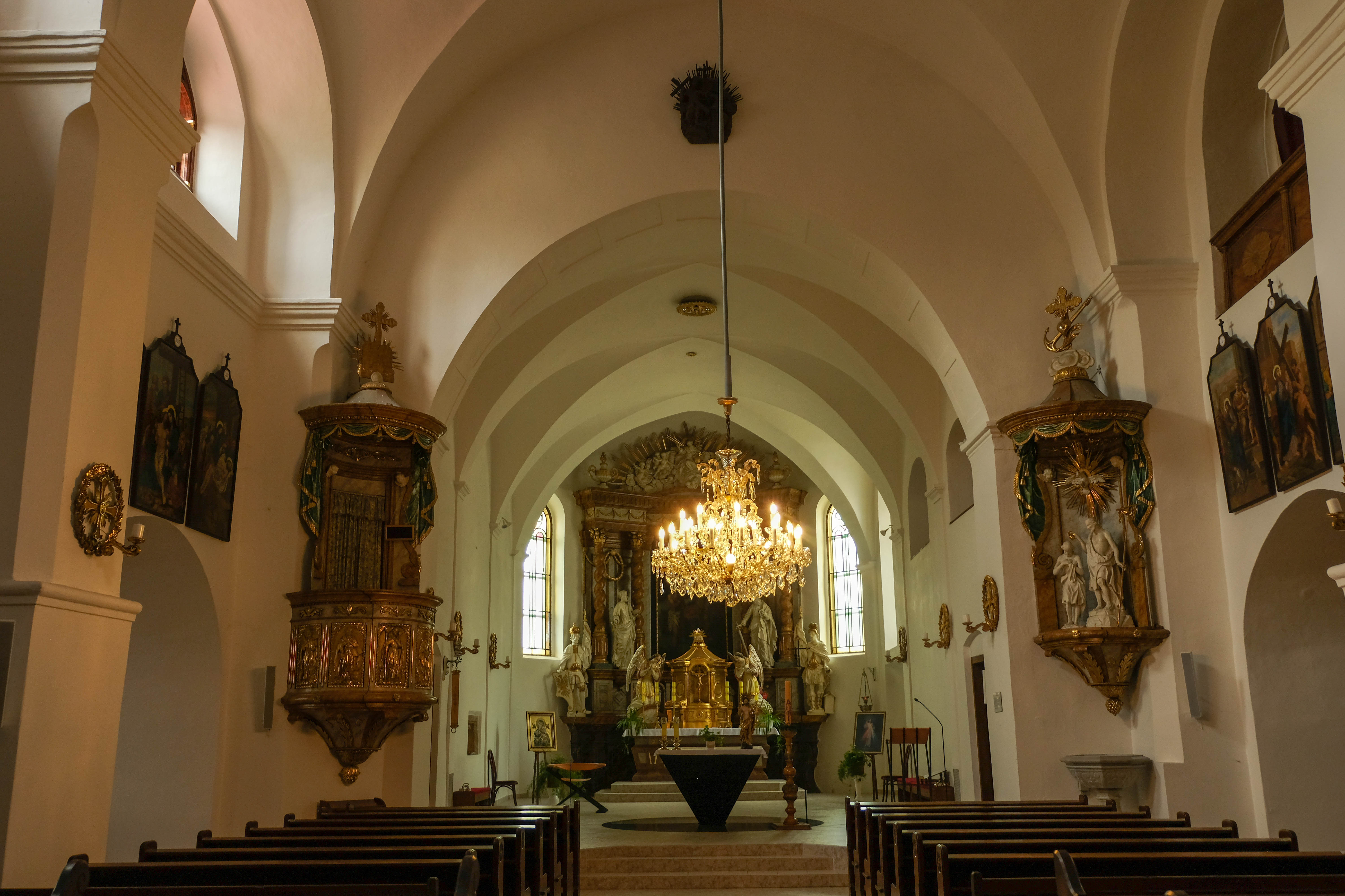 Hlavní loď